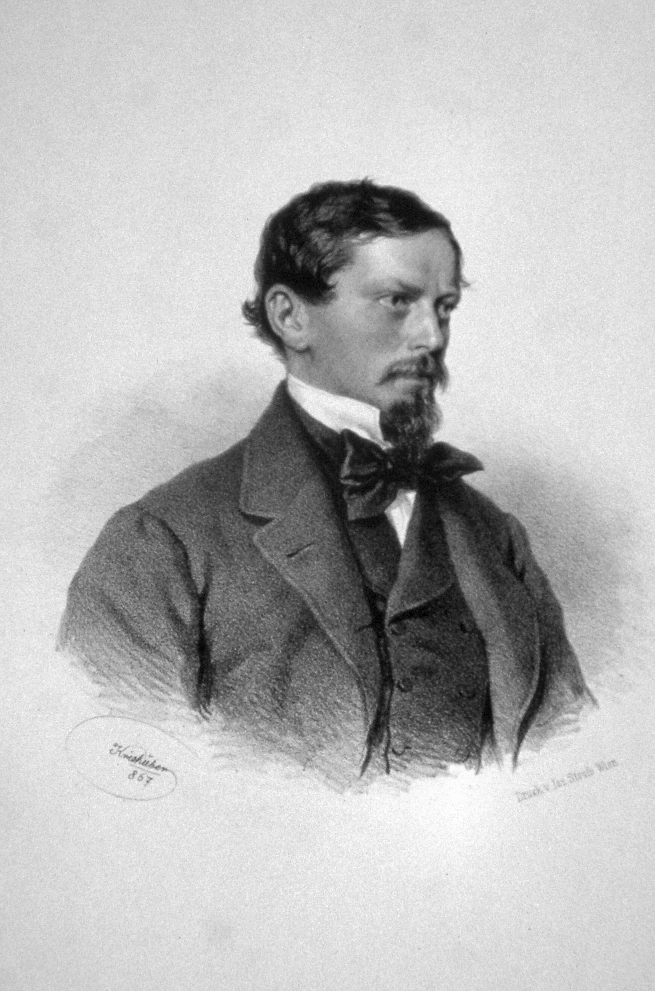 Franz II Klein Freiherr von Wisenberg (1825-1882), österreichischer Industrieller, Lithographie von Josef Kriehuber, 1867